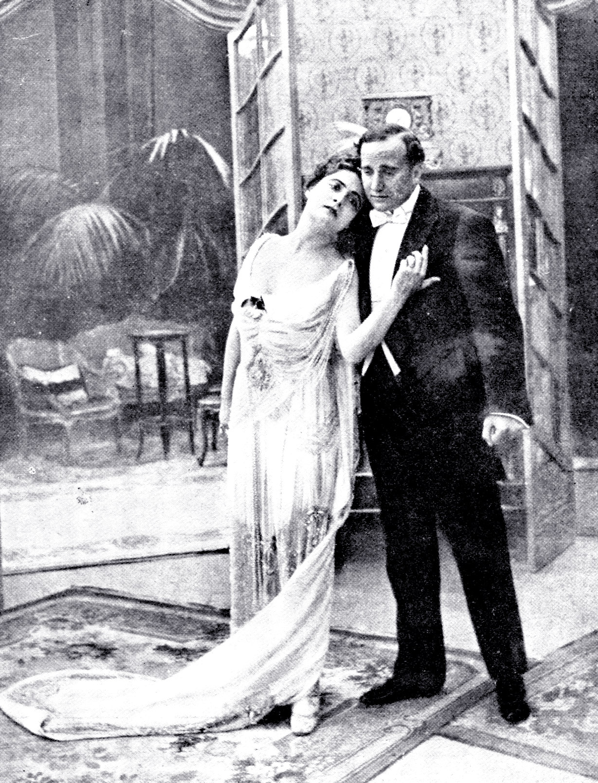 Una scena de La signora delle camelie (1915 - ed "Caesar Film") con Francesca Bertini e Gustavo Serena